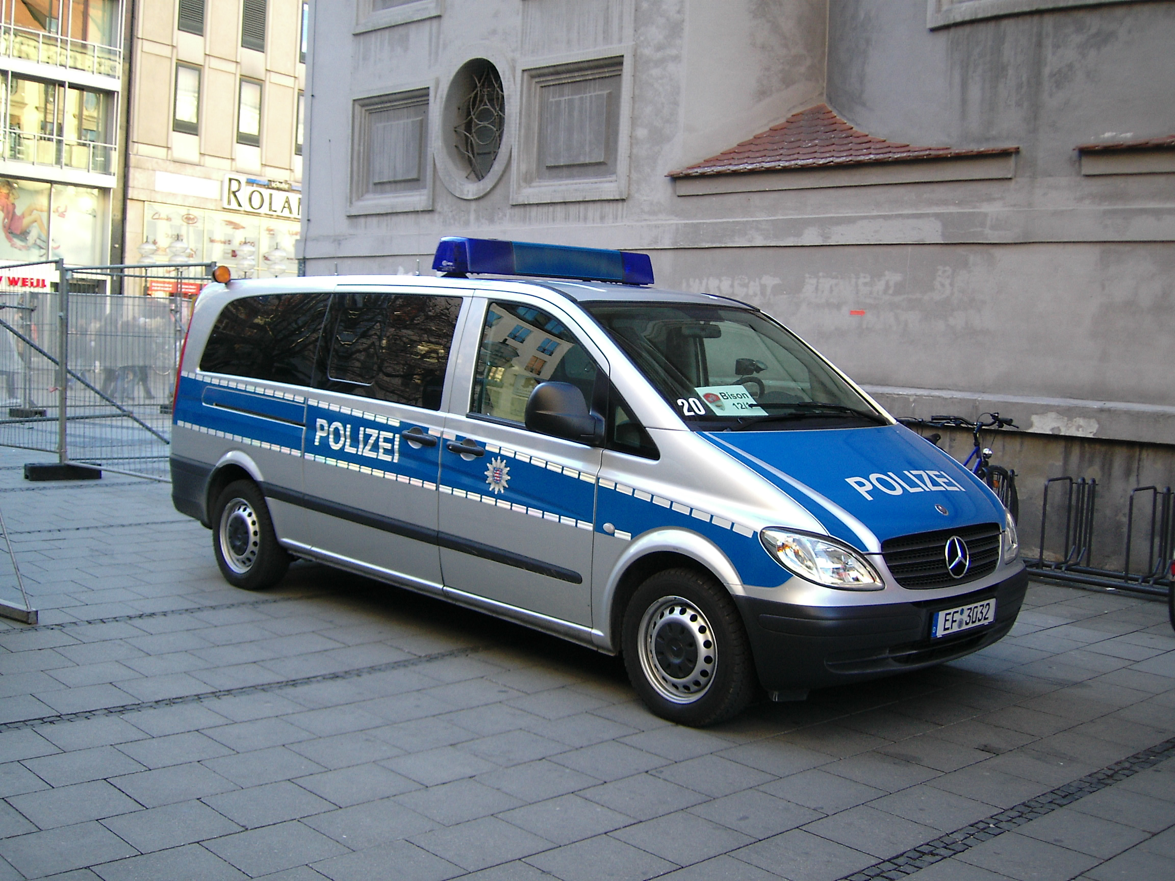 Streifenwagen der Polizei Erfurt